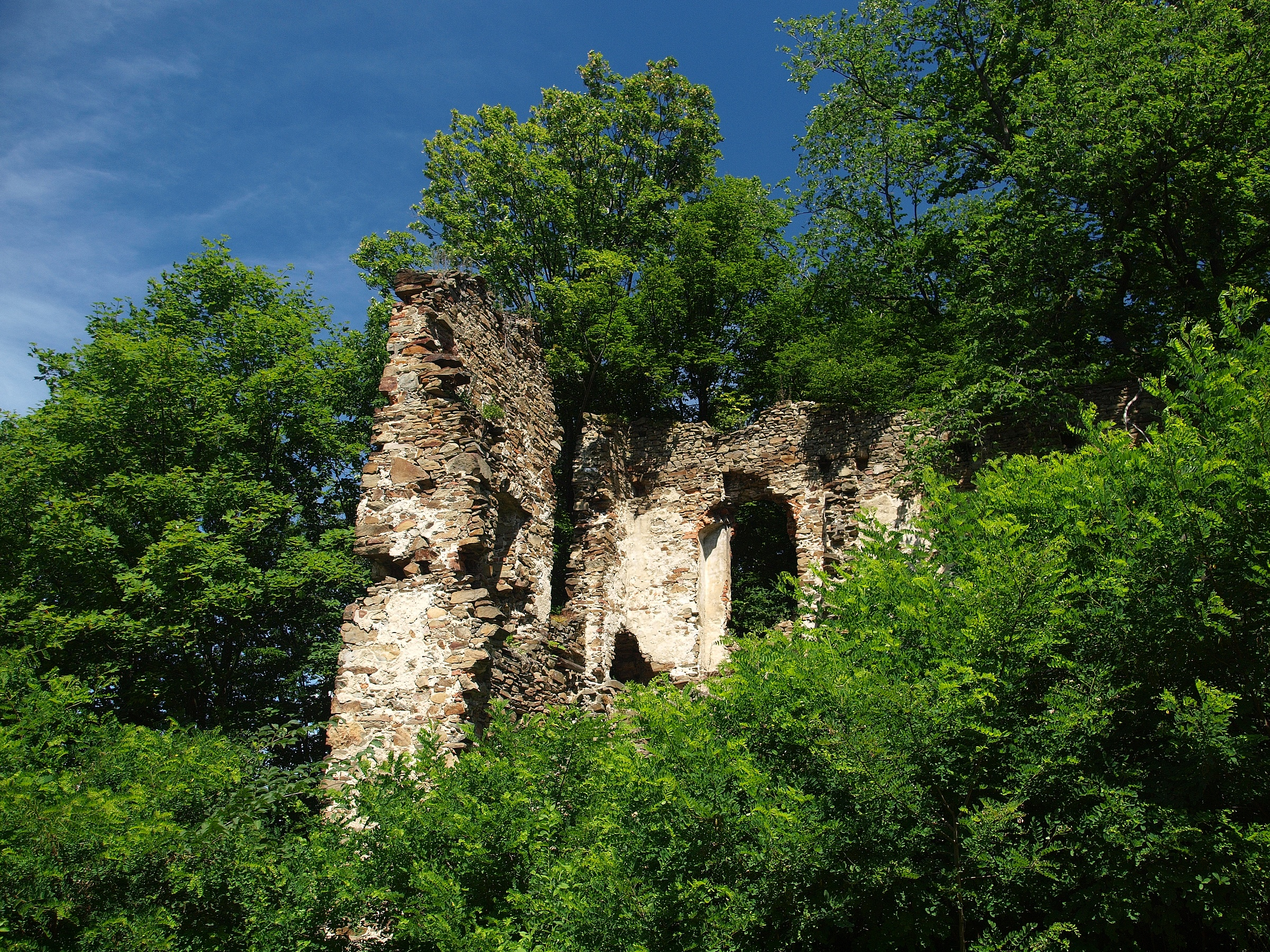 Hrad Vikštejn, zřícenina (Dubová), nad silnicí Melč - Radkov, Dubová